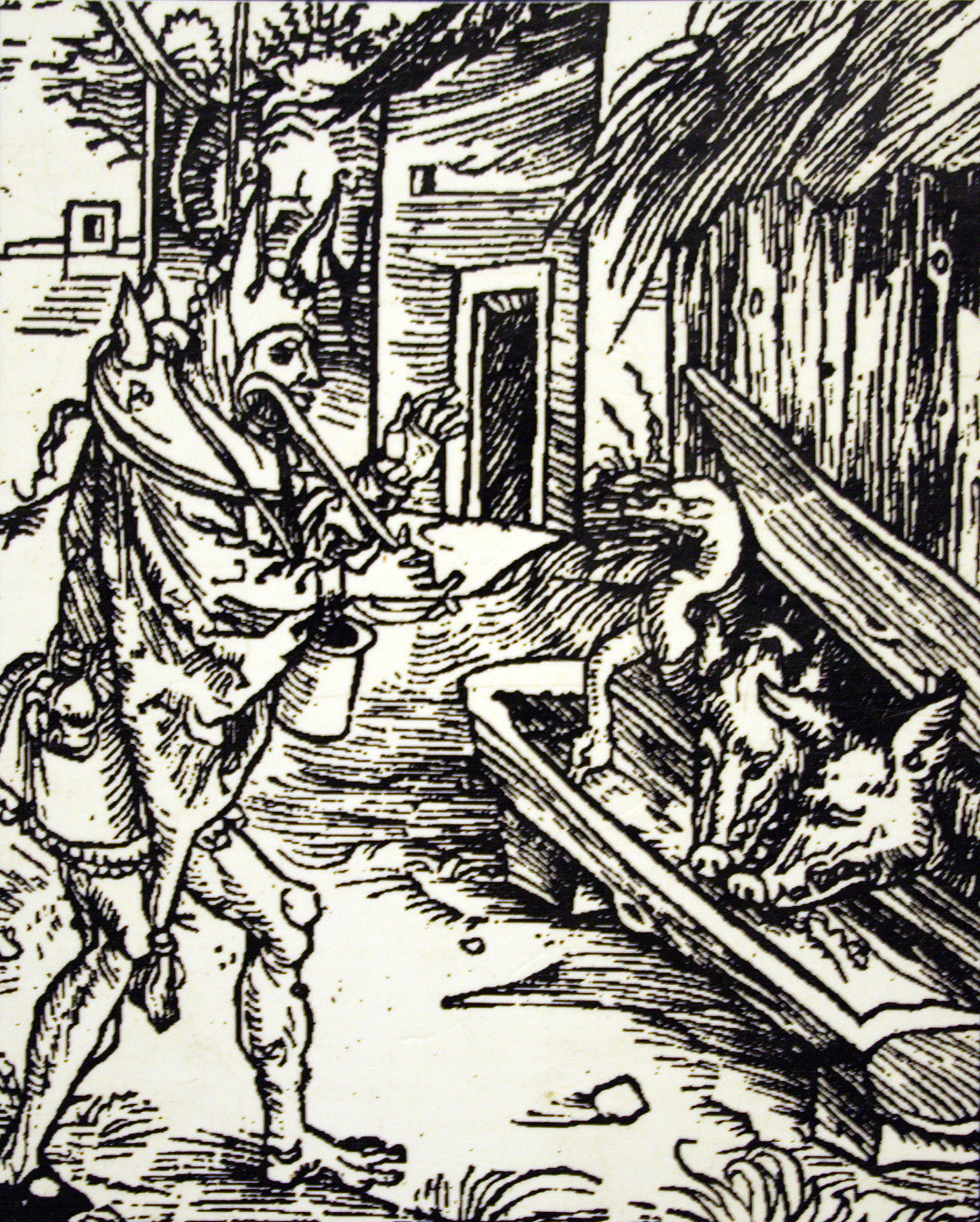 Néscio discursando aos porcos e gansos